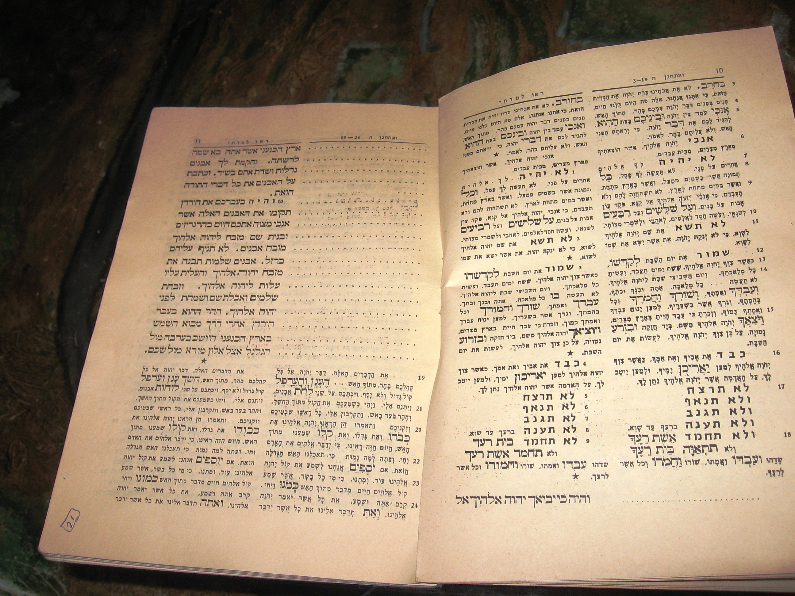 תרבות השומרונים בהר זריזים